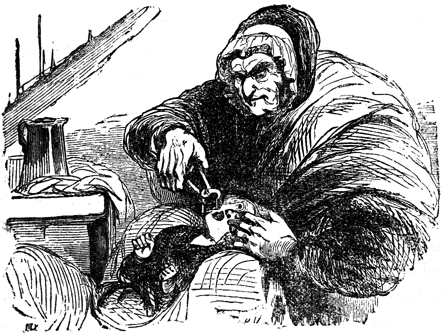 La Chouette punit Fleur-de-Marie en lui arrachant une dent. Illustration de 1843